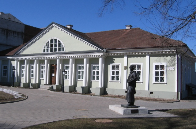 Дом-музей Ваньковича, Минск, РБ